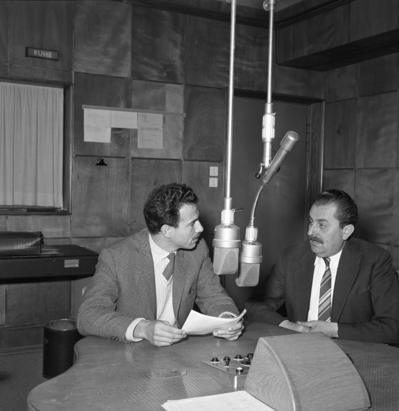 Arabische Rundfunkredaktion der Deutschen Welle in Köln Sprecher einer arabischen Sendung bei der Arbeit